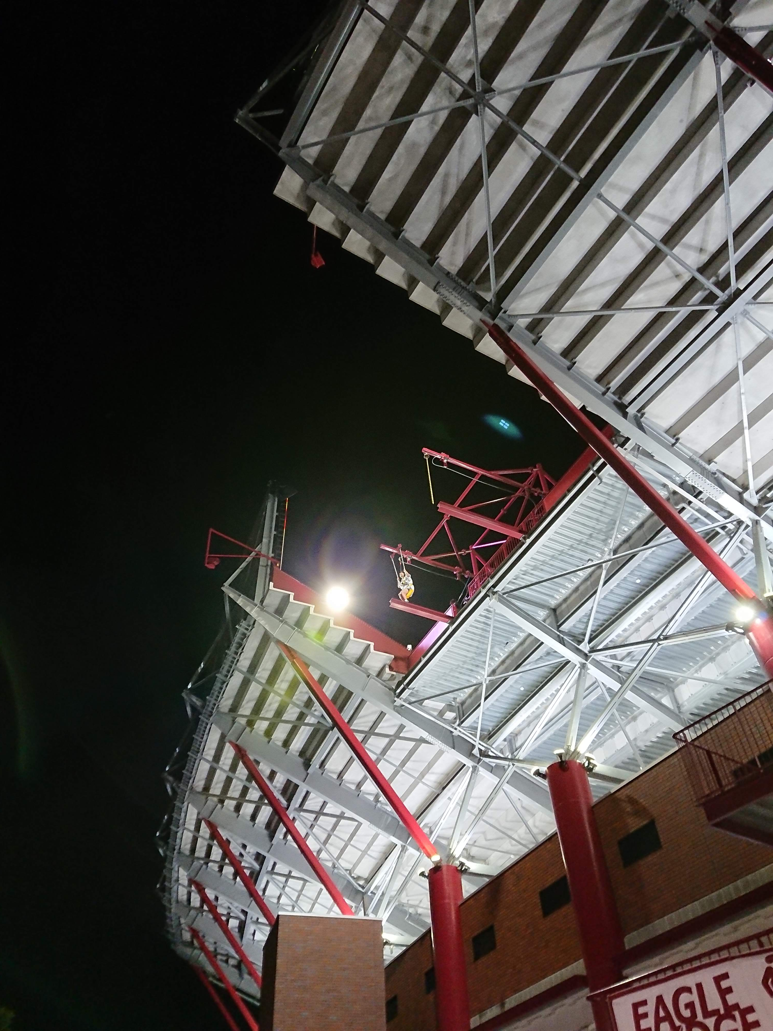 楽天生命パーク宮城・バイバースタンド上段に設置されたアトラクション「EAGLE BRIDGE」。手前側の先端には「勝利の鐘」、奥側の先端には空中ブランコが設置されている。